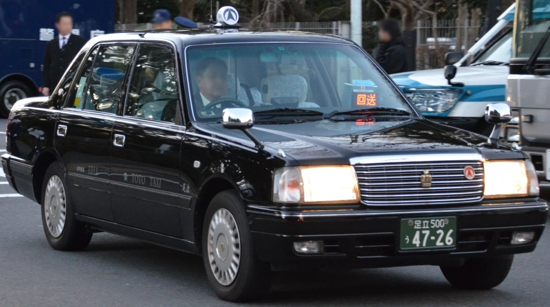 東都自動車の黒塗りハイグレードタクシー